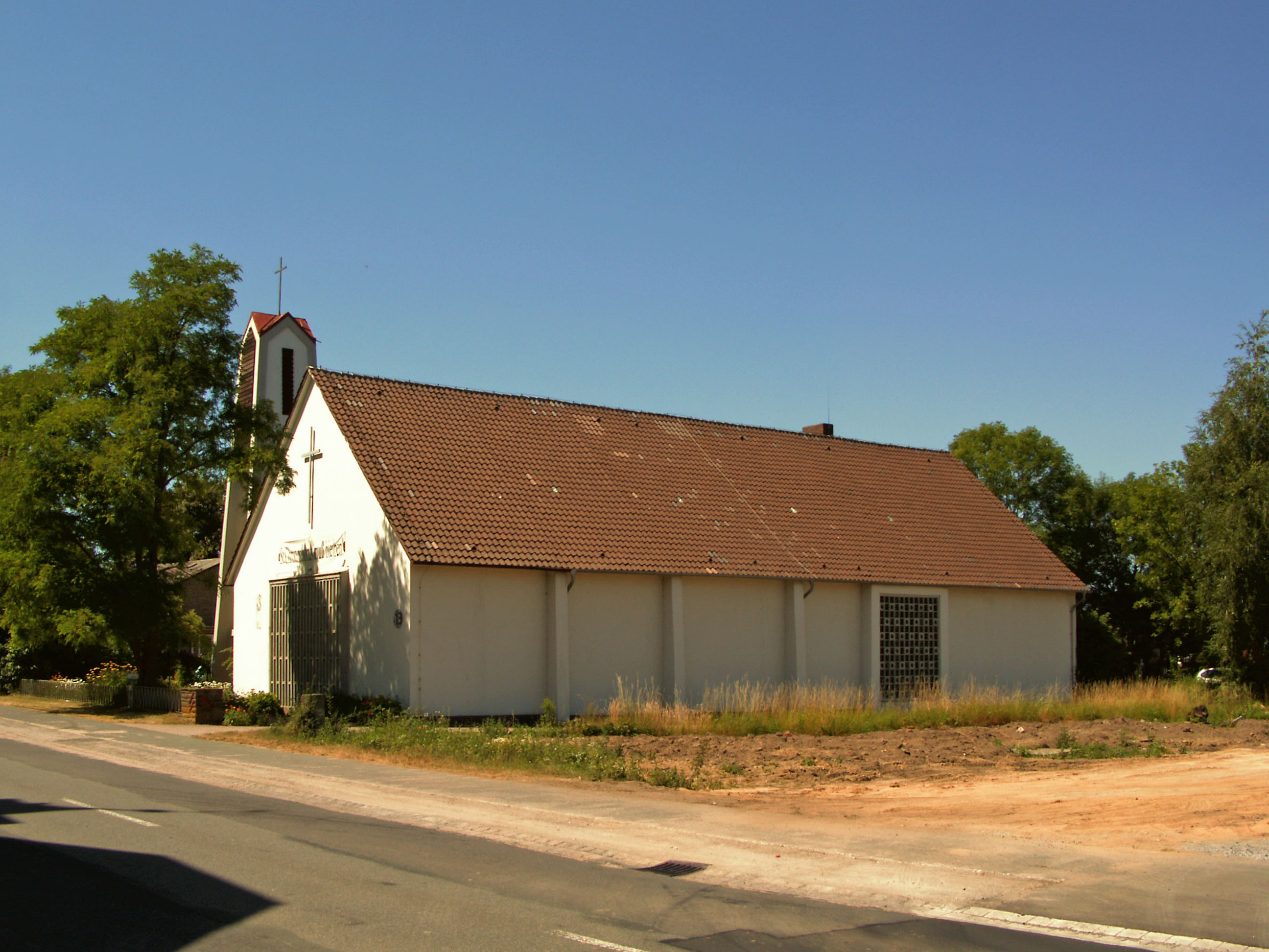 Katholische Kirche St. Christophorus in Holtensen, Ortsteil von Wennigsen (Ostseite)